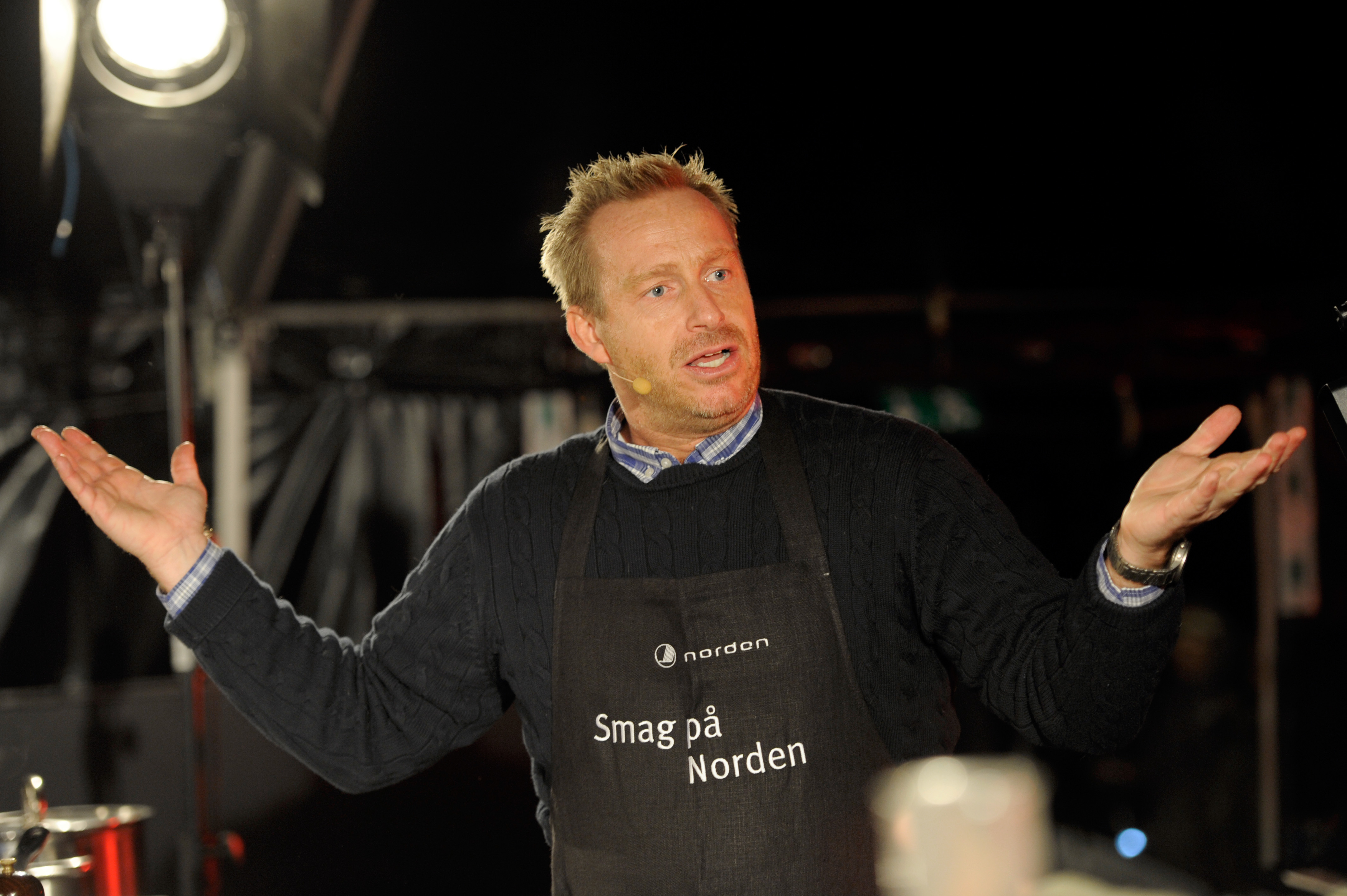 Brødrene Price lagar mat på Kulturnatten 2010.